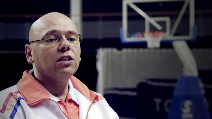 Gertjan van der Linden, basketbalcoach van het Nederlands rolstoelbasketbalteam in de documentaire 'Doorgaan' uit 2011